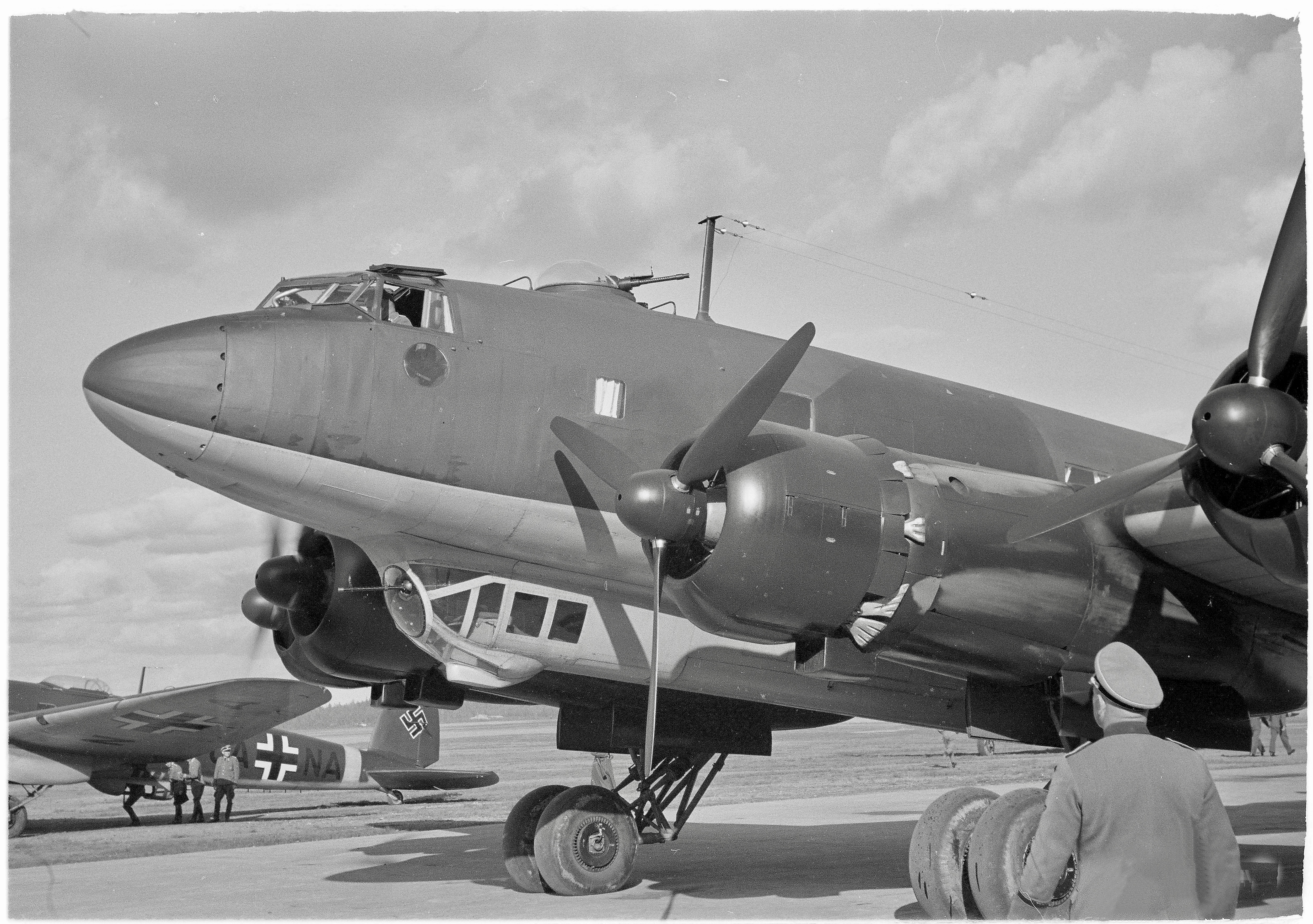 Adolf Hitlerin vierailu marsalkka Mannerheimin 75-vuotissyntymäpäivillä. (Kuvassa on Focke-Wulf Fw 200C-3/U9). Kuvauspaikka: Immolan lentokenttä